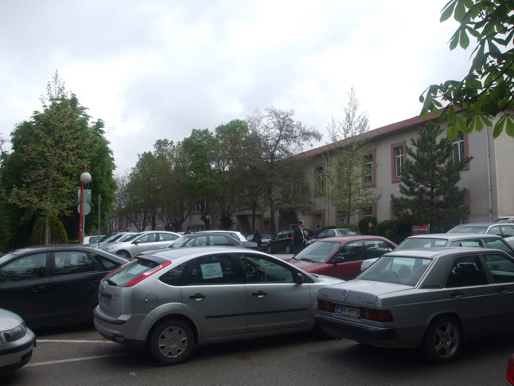 Ankara Üniversitesi Tıp Fakültesi binası, 2011.